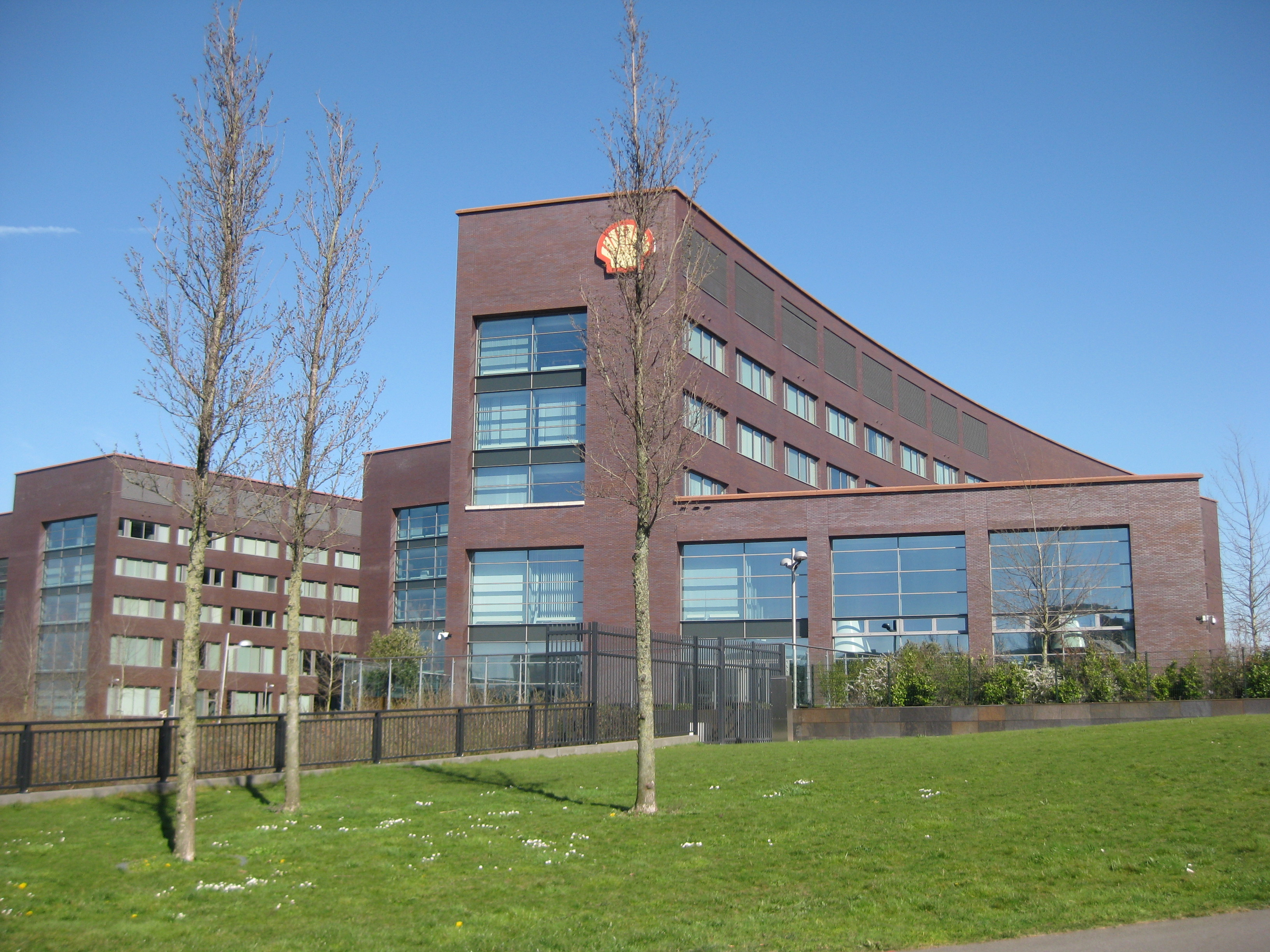 Shell Technology Centre in Amsterdam-Noord